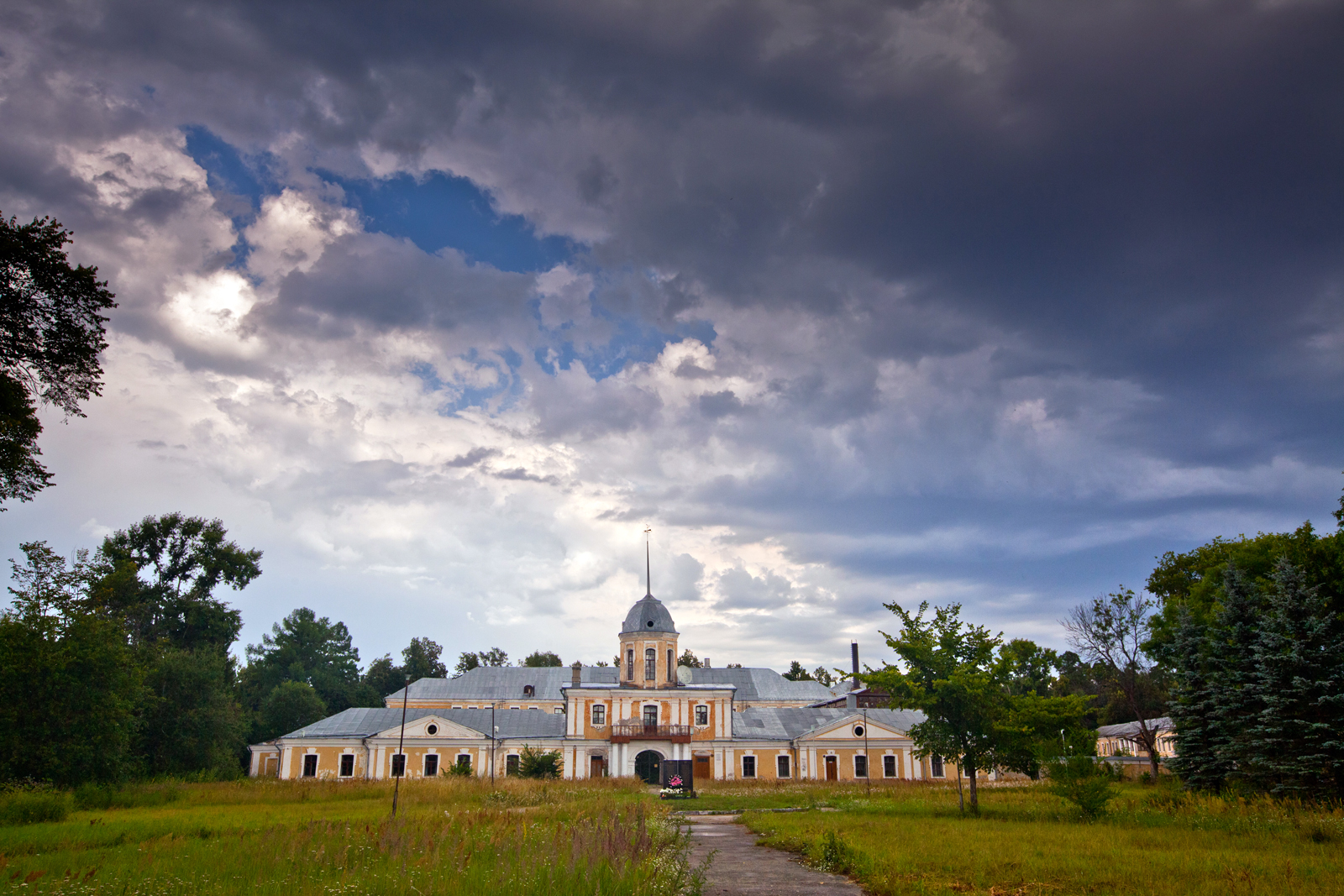 Усадьба графа Воронцова в селе Андреевское Петушинского района, Владимирской области